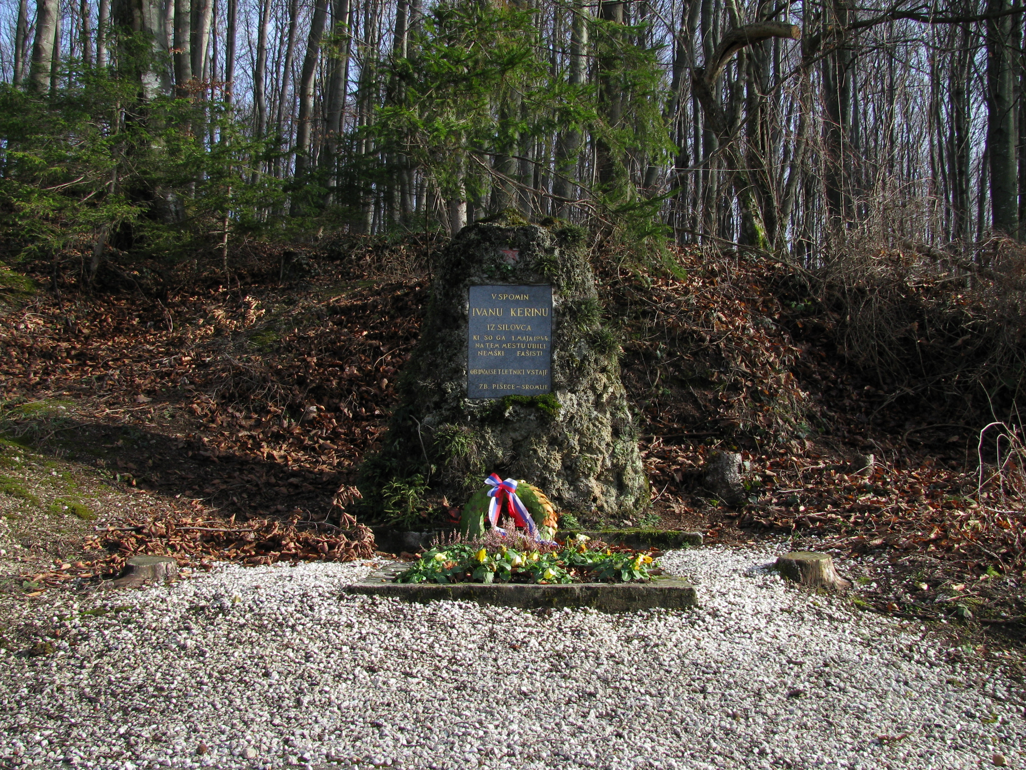 Kerinov križ oziroma spomenik